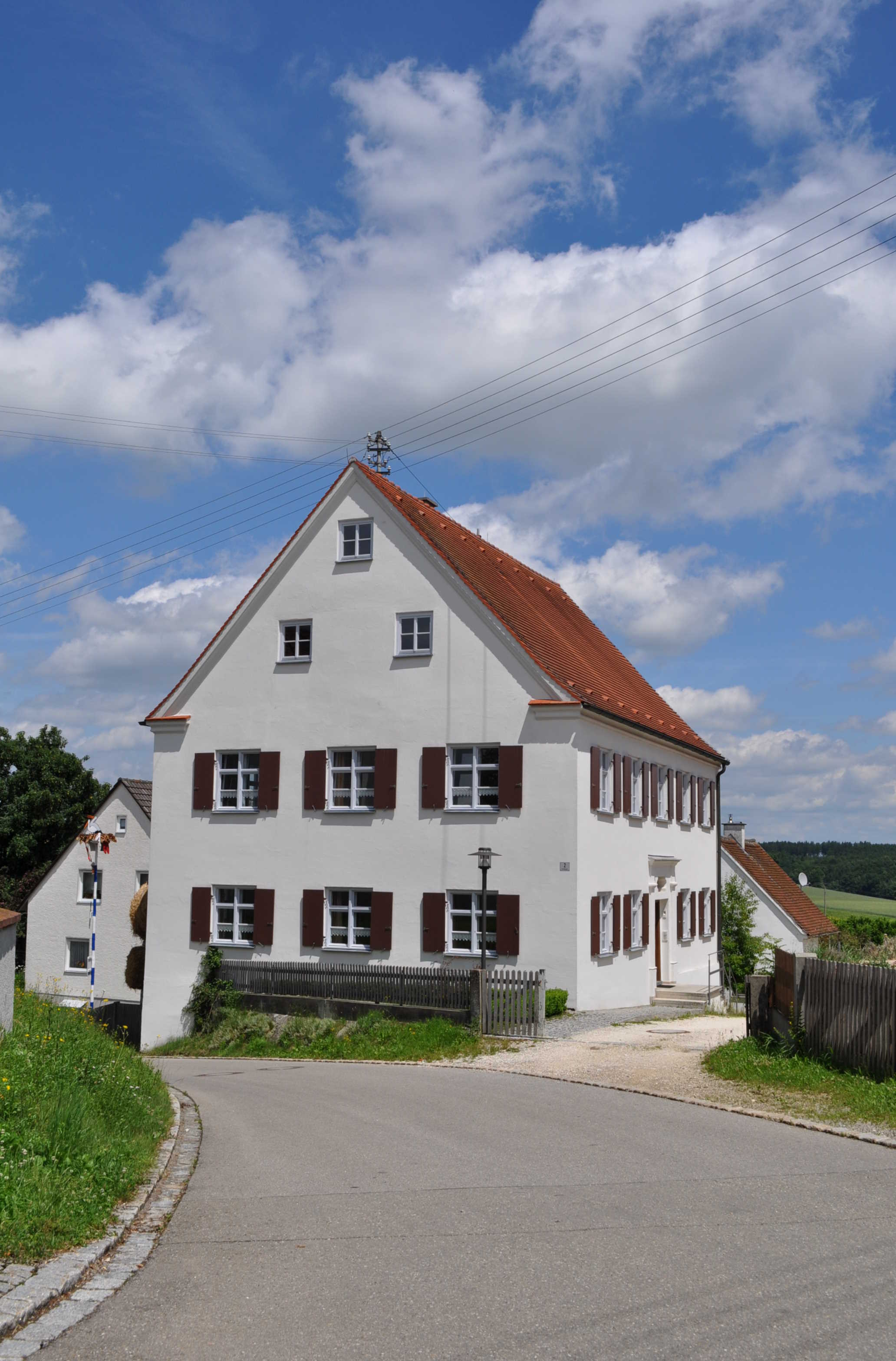 Pfarrhaus in Hafenhofen einem Ortsteil von Haldenwang im Landkreis Günzburg (Bayern)